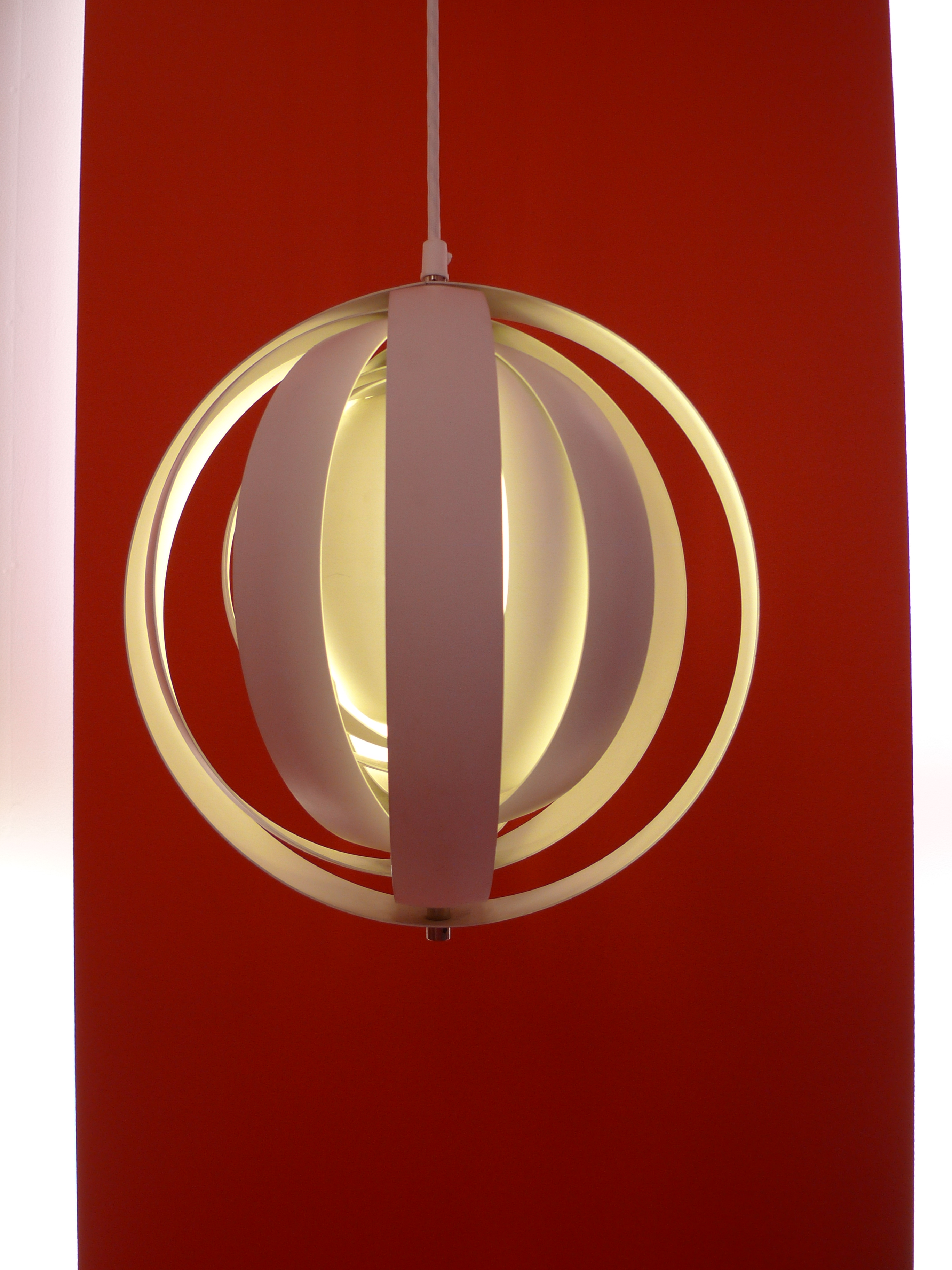 Verner Panton's Moon Lamp in Design Museum Denmark in Copenhagen, Denmark